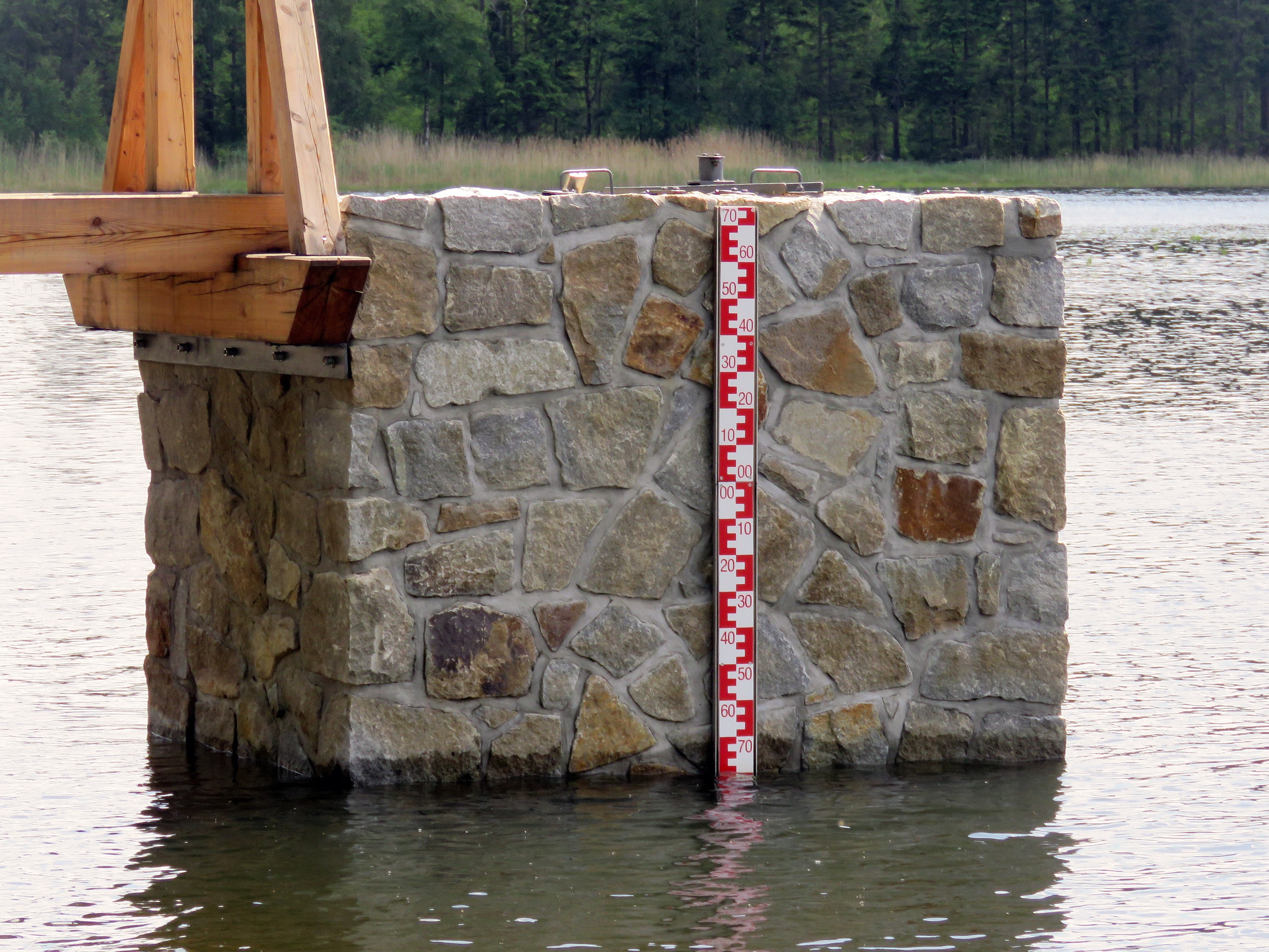 K dosažení stálého nadržení nechybí po devíti měsících plnění hráze mnoho – toliko 80 centimetrů (značka „00“). Maximální úroveň hladiny při povodni, jištěná vyšším ze dvou přelivů, leží ještě o 40 cm výše.